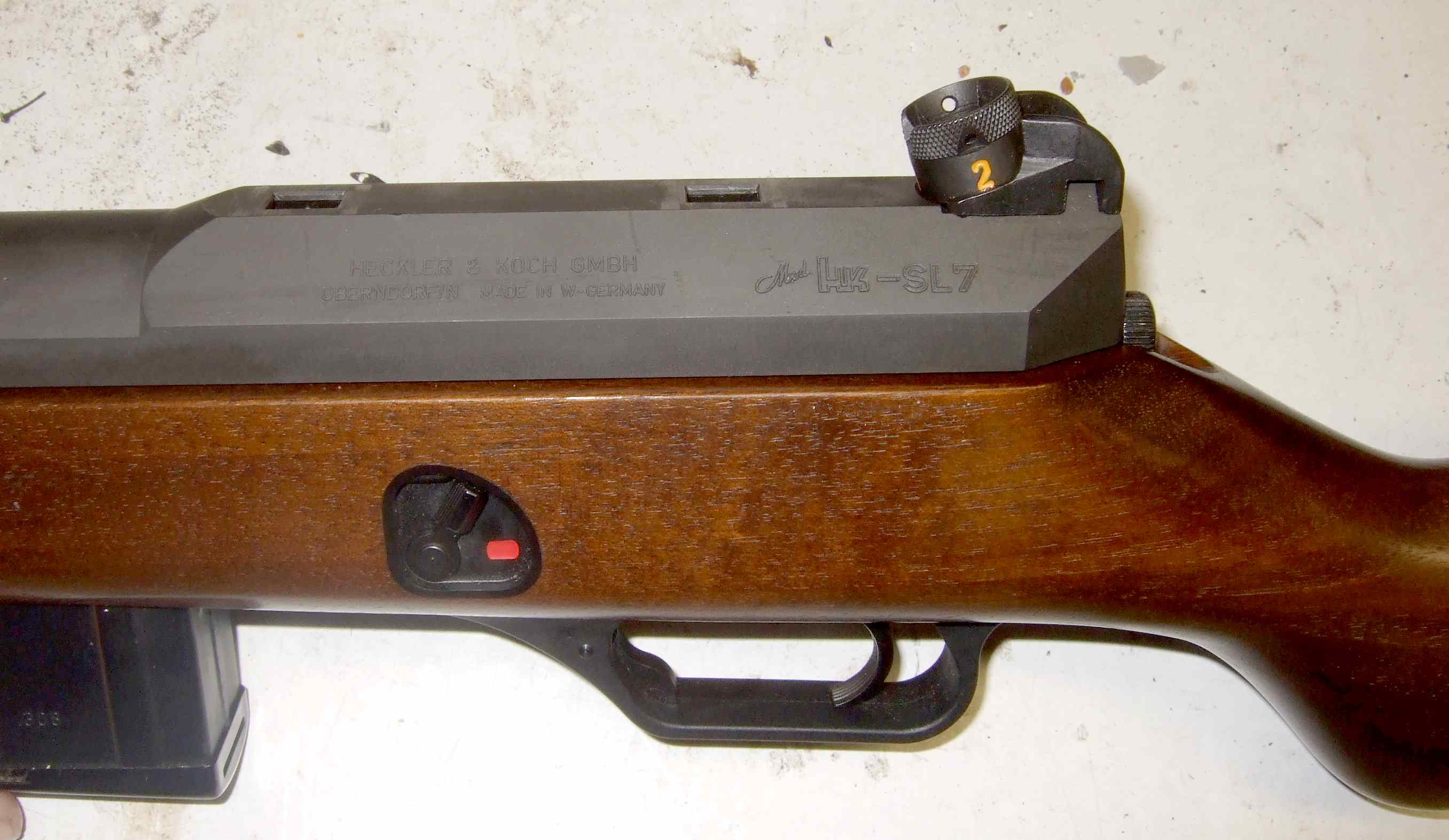 Ansicht Diopter und Schriftzug Heckler & Koch SL7